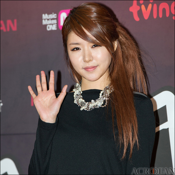 김그림. '보이스코리아' 제작발표 및 하이라이트 시사회에서